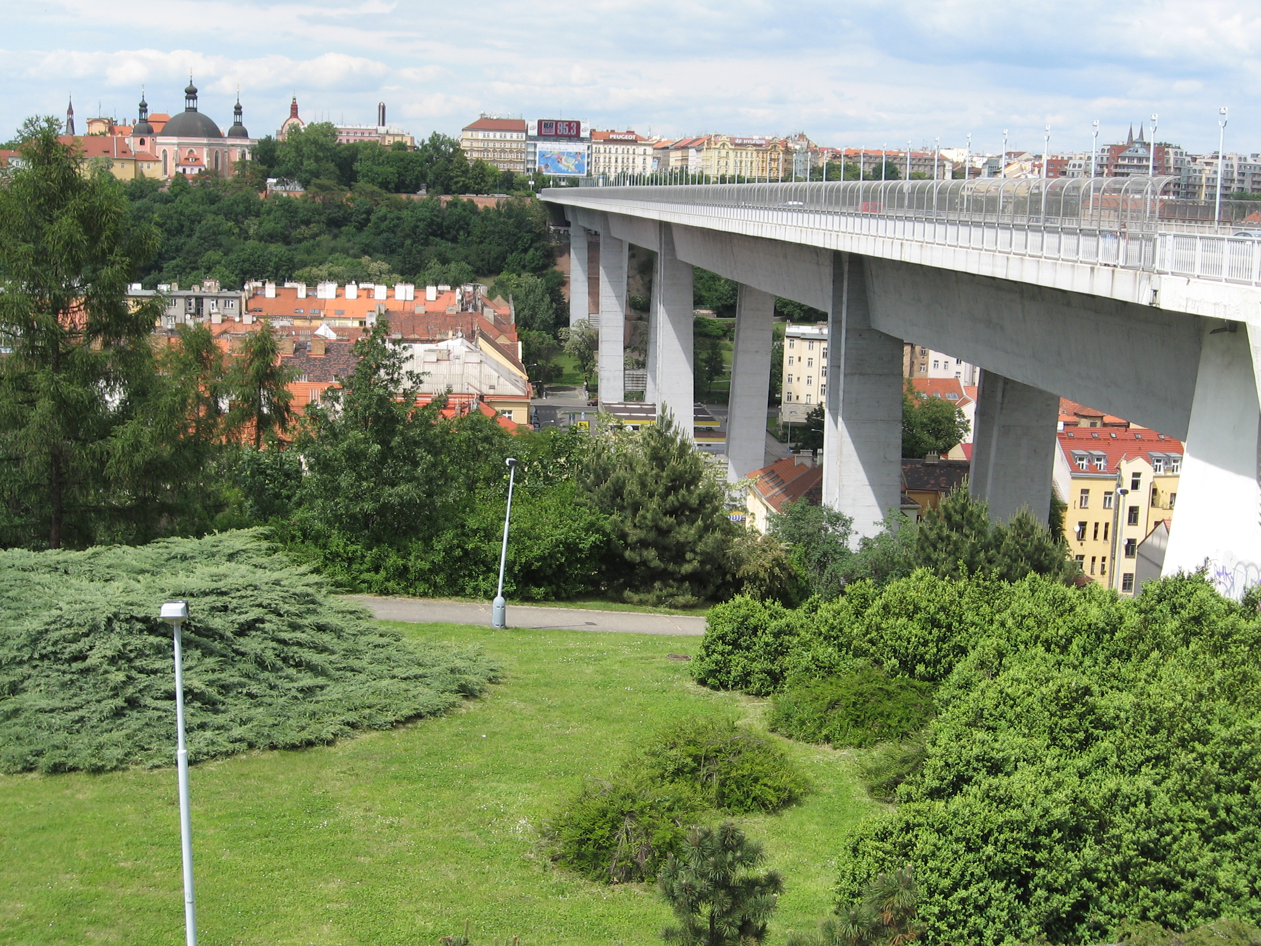 Nuselský most, Praha, Czechia